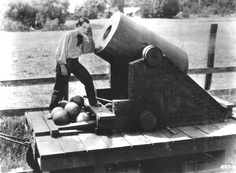 screenshot van de film 'The General'